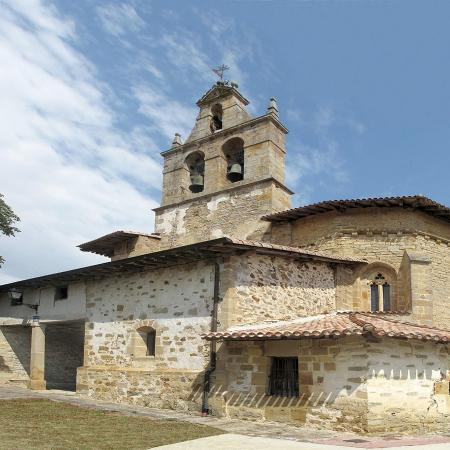 Vista Iglesia de San Juan Bautista